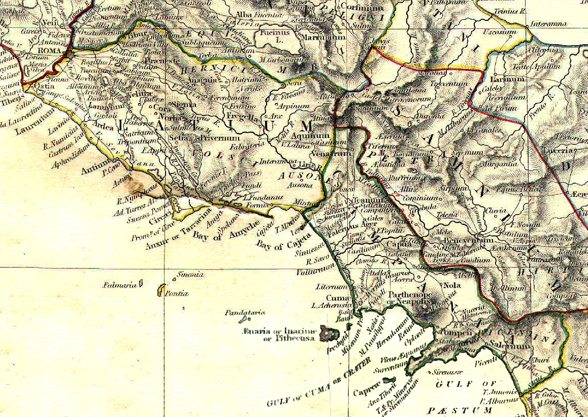 Reference map for Roman Empire Regium I Latium et Campania